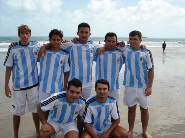 Foto de um time amador de praia do bairro do Pirambu, Fortaleza